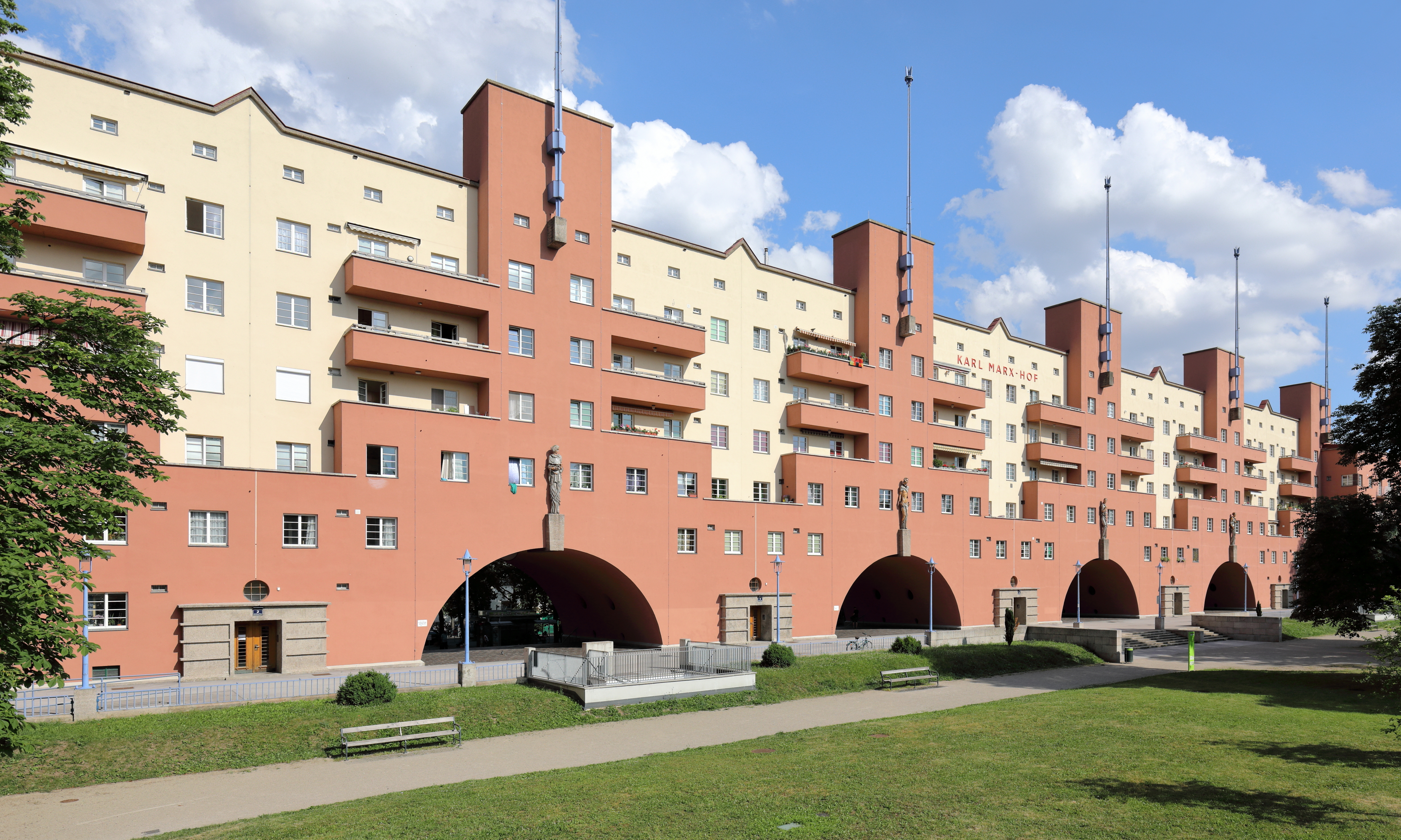 Der stark zurückversetzte Mitteltrakt mit seinen sechs monumentalen Türmen der denkmalgeschützten Wohnhausanlage Karl-Marx-Hof der Gemeinde Wien im 19. Wiener Gemeindebezirk Döbling.Der Bau mit 1382 (aktuell rd. 1270) Wohneinheiten wurde von 1927 bis 1933 nach Plänen des Architekten Karl Ehn errichtet (die offizielle Eröffnung der Anlage fand am 12. Oktober 1930 statt). Er ist wohl der repräsentativste, sicherlich aber der bekannteste kommunale Wohnbau der Stadt Wien als Musterbeispiel eines monumentalen Superblocks. Er erstreckt sich über 1.100 Meter entlang der Heiligenstädter Straße und ist damit der längste zusammenhängende Wohnbau der Welt.Die vier Figuren über den Rundbögen sind Werke des Bildhauers Josef Franz Riedl (1884–1965) und symbolisieren die „Freiheit“, die „Fürsorge“, die „Aufklärung“ und die „Körperkultur“.